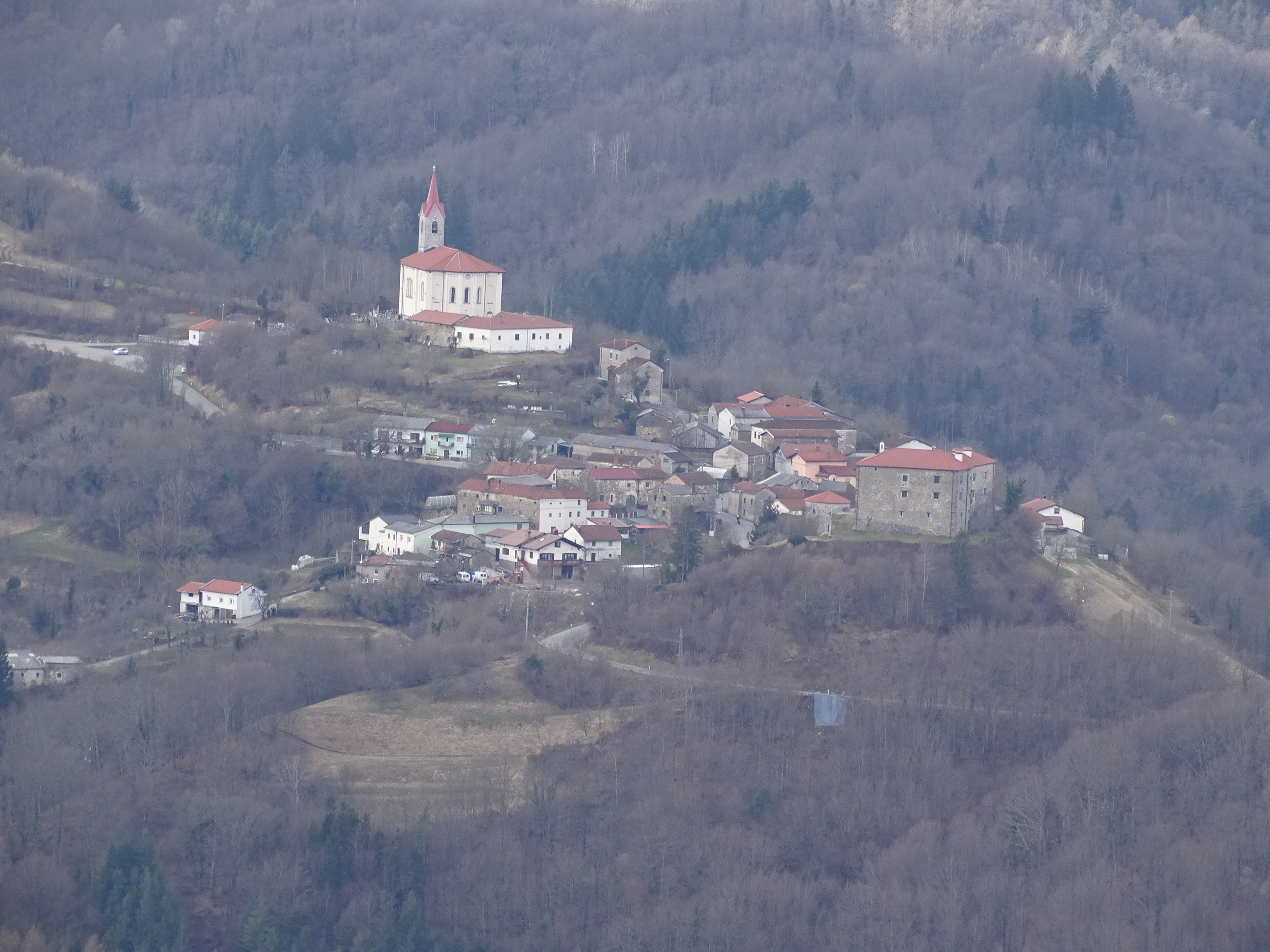 Castello, chiesa e abitato di Prem